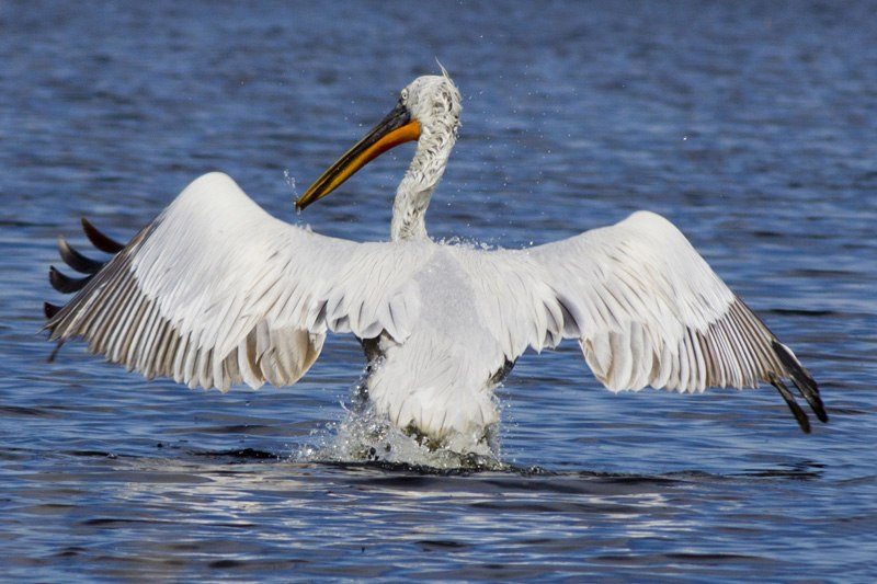 Кудрявый пеликан на озере Курлады (Челябинская область)